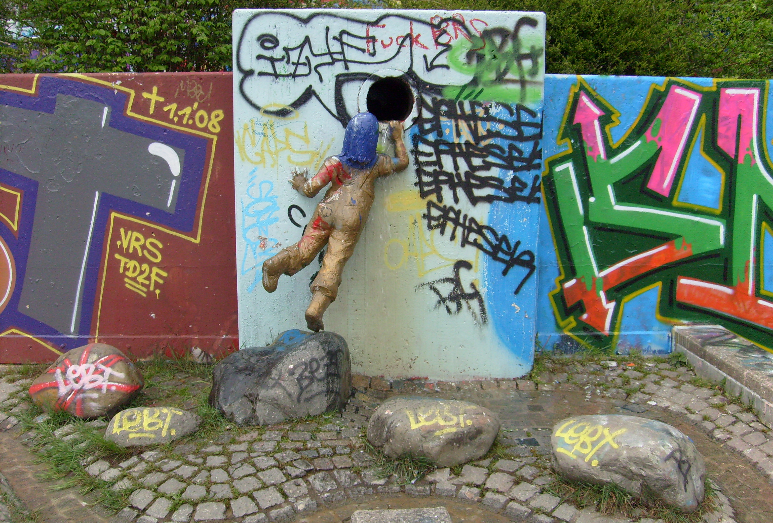 Spielbrunnen von Ulle Hees, aufgestellt 1983 auf dem Terrassengelaende ueber der Tiefgarage an der Kasinostrasse in Wuppertal-Elberfeld